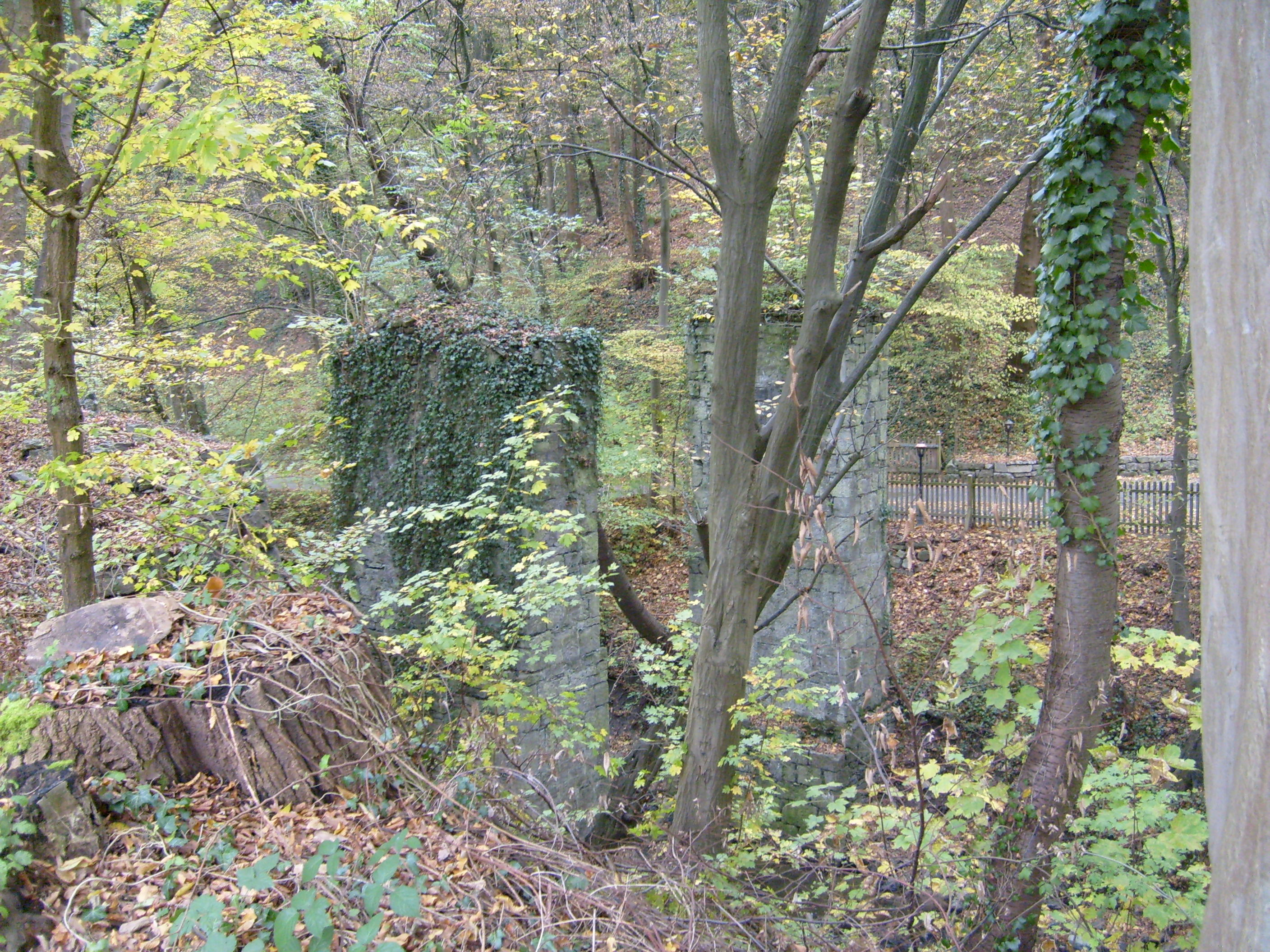 Verbliebene Pfeiler einer alten Lorenbahn des Kalkabbruchs im Neandertal, Nähe Rabenstein